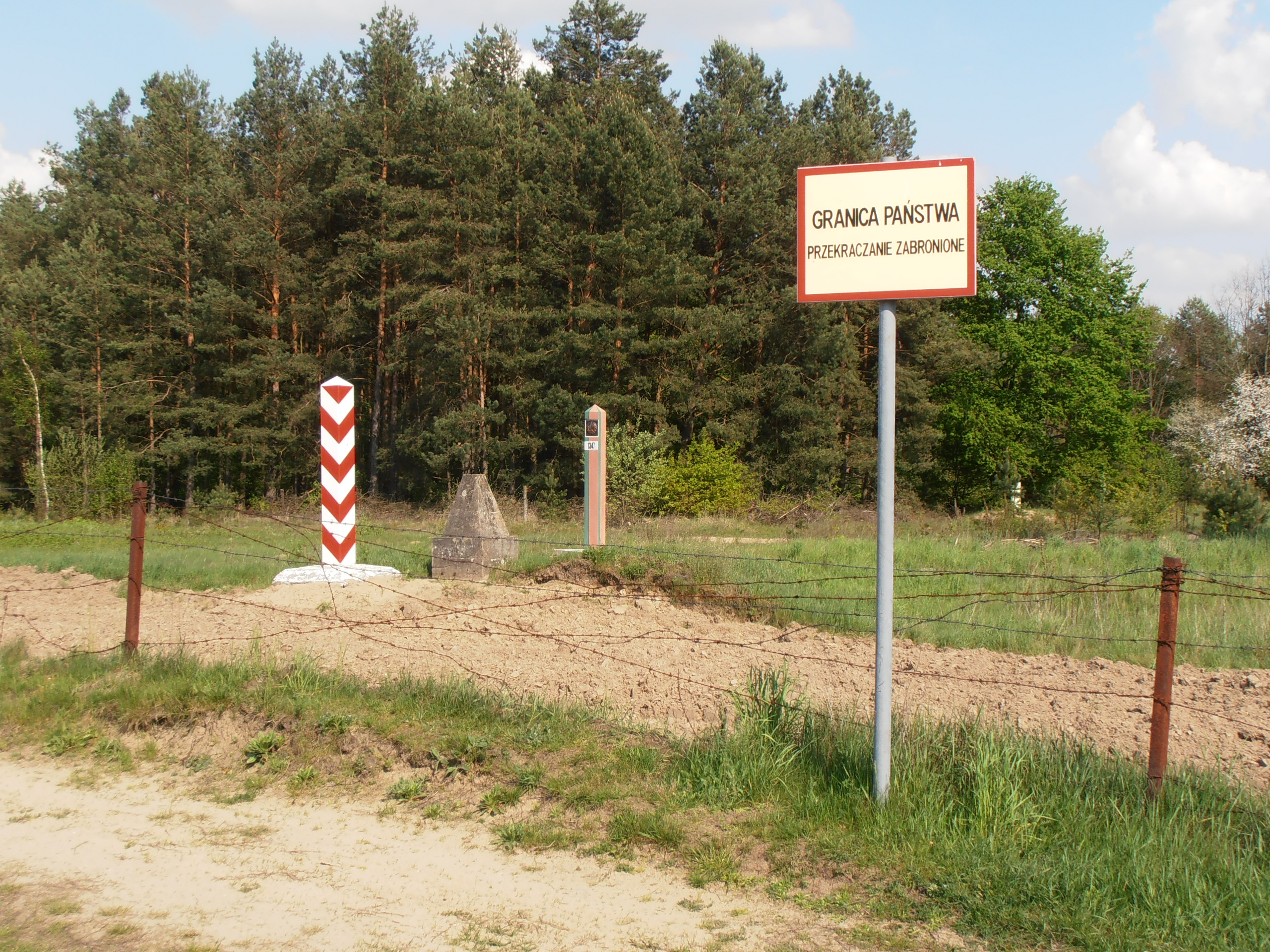 Niemirów (pow. siemiatycki, woj. podlaskie, Polska). Granica polsko-białoruska w okolicy Bugu.